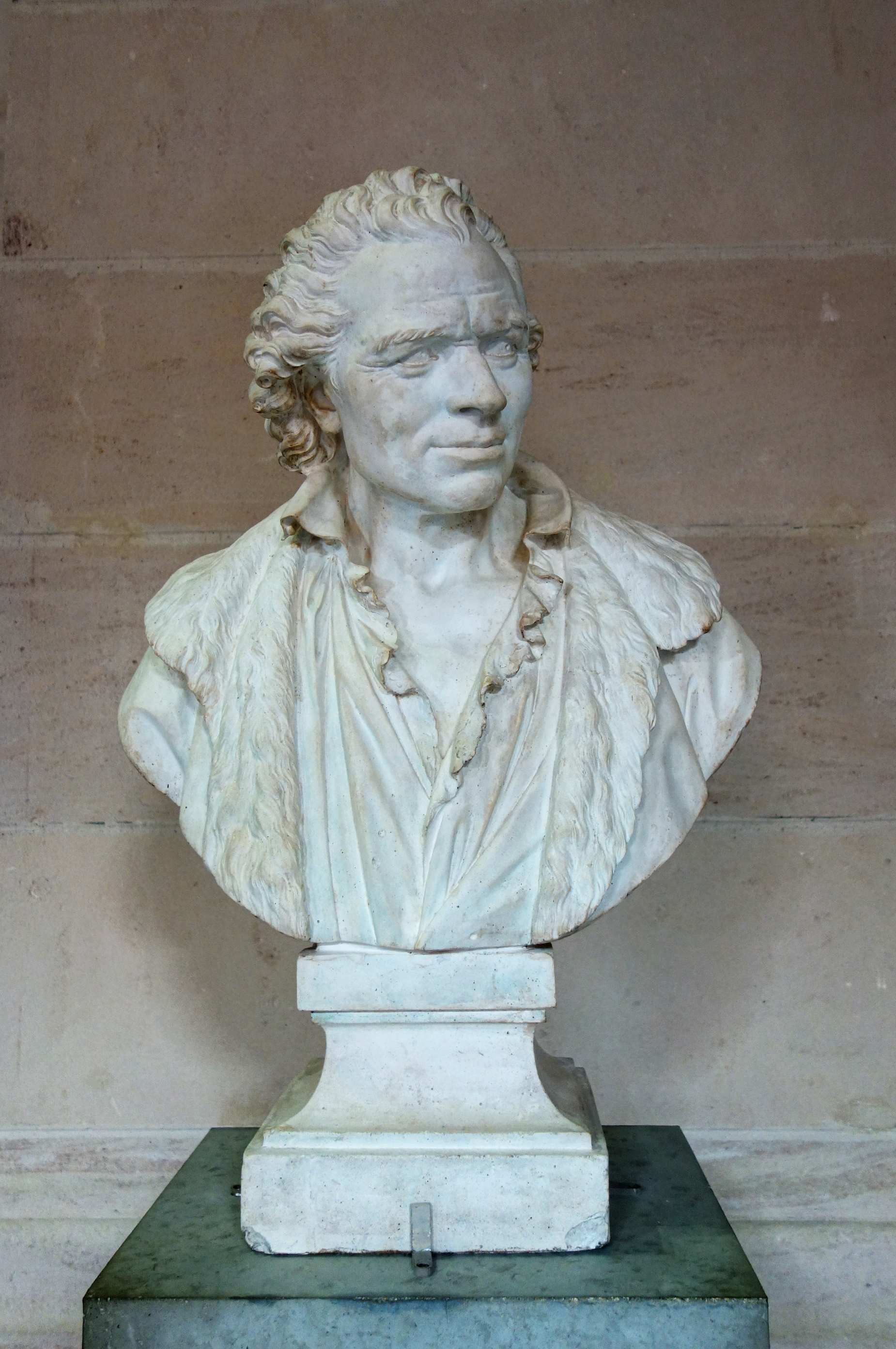 Charles de Wailly, architecte au Palais des beaux-arts de Lille.